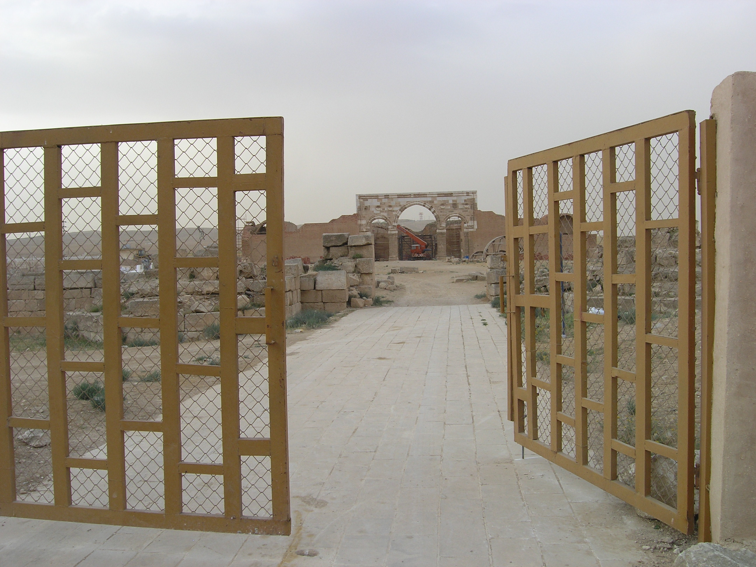 Mshatta - umayyadisches Wüstenschloss in Jordanien. Eingang.